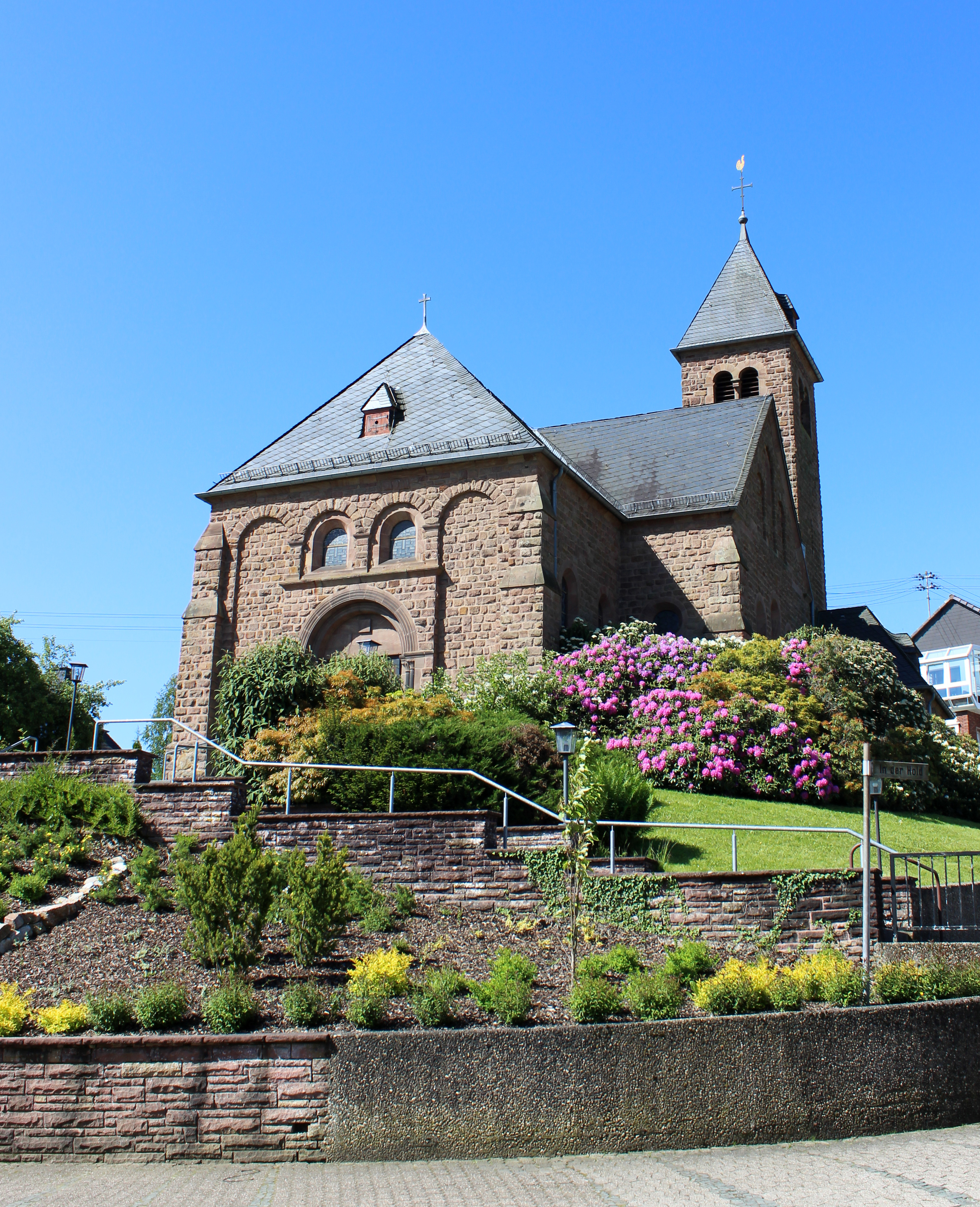 Die katholische Filialkirche St. Antonius von Padua in Niedersaubach, einem Stadtteil von Lebach, Landkreis Saarlouis, Saarland